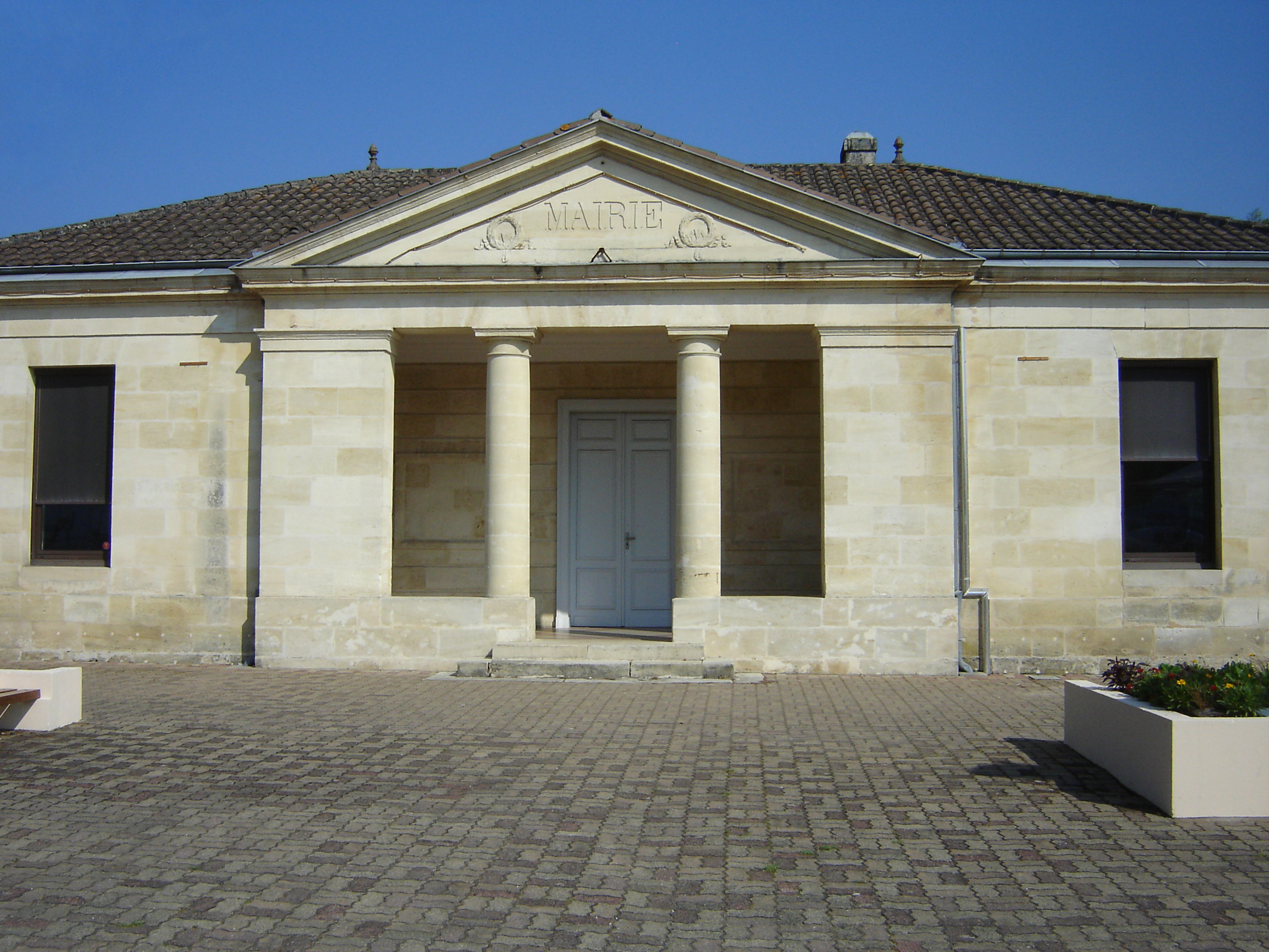 Mairie de Saint-Jean-d'Illac (Gironde, France). Construction de la première partie en 1875